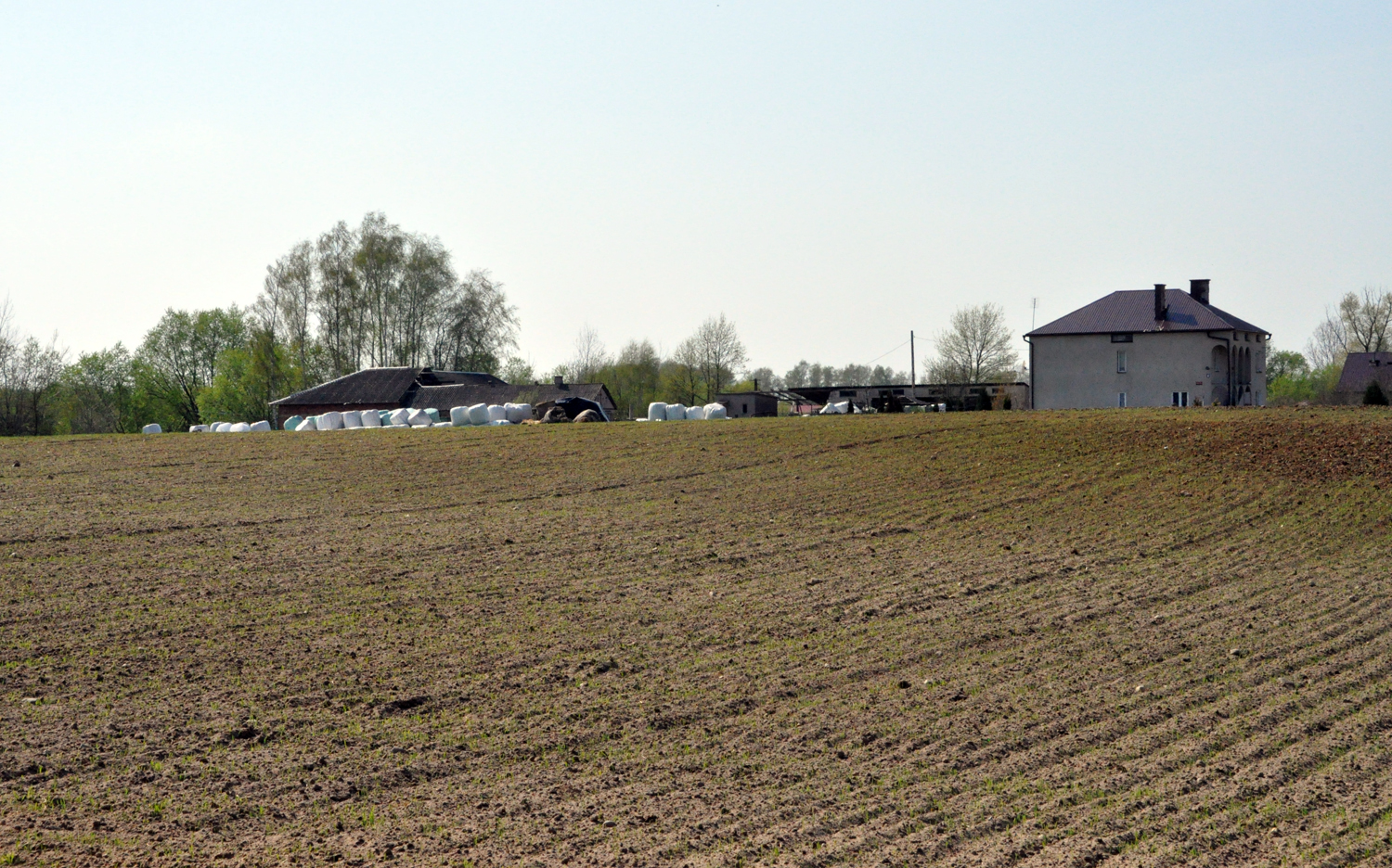 Widok wieś